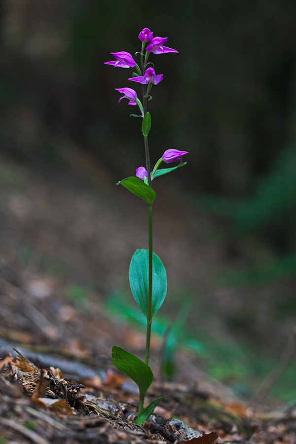 Cephalanthera rubra - Rotes Waldvögelein